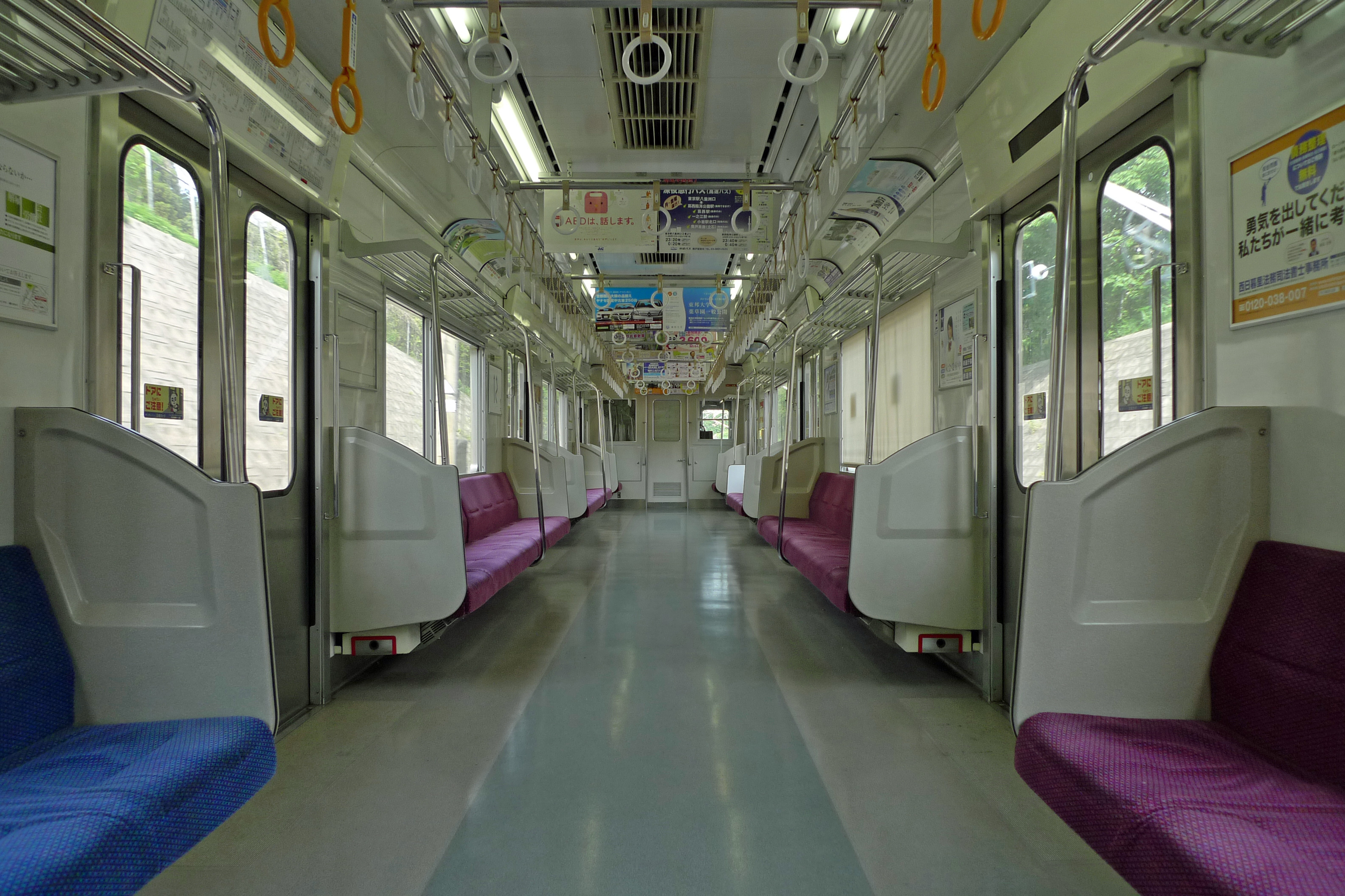 京成3000系（2代目）3003-1車内